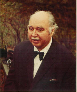 Franz Schömbs in den 70er Jahren